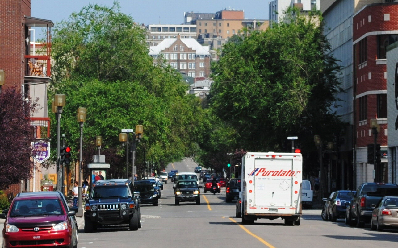 Basse Racine à Chcoutimi, Québec